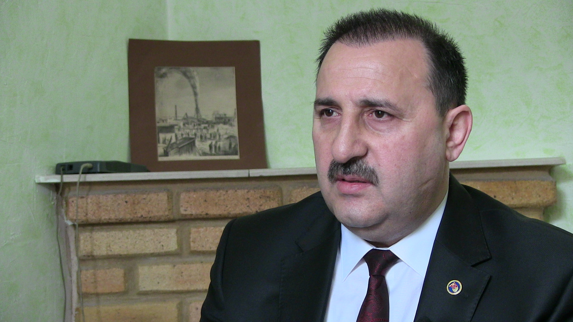 Nazim Bəydəmirli